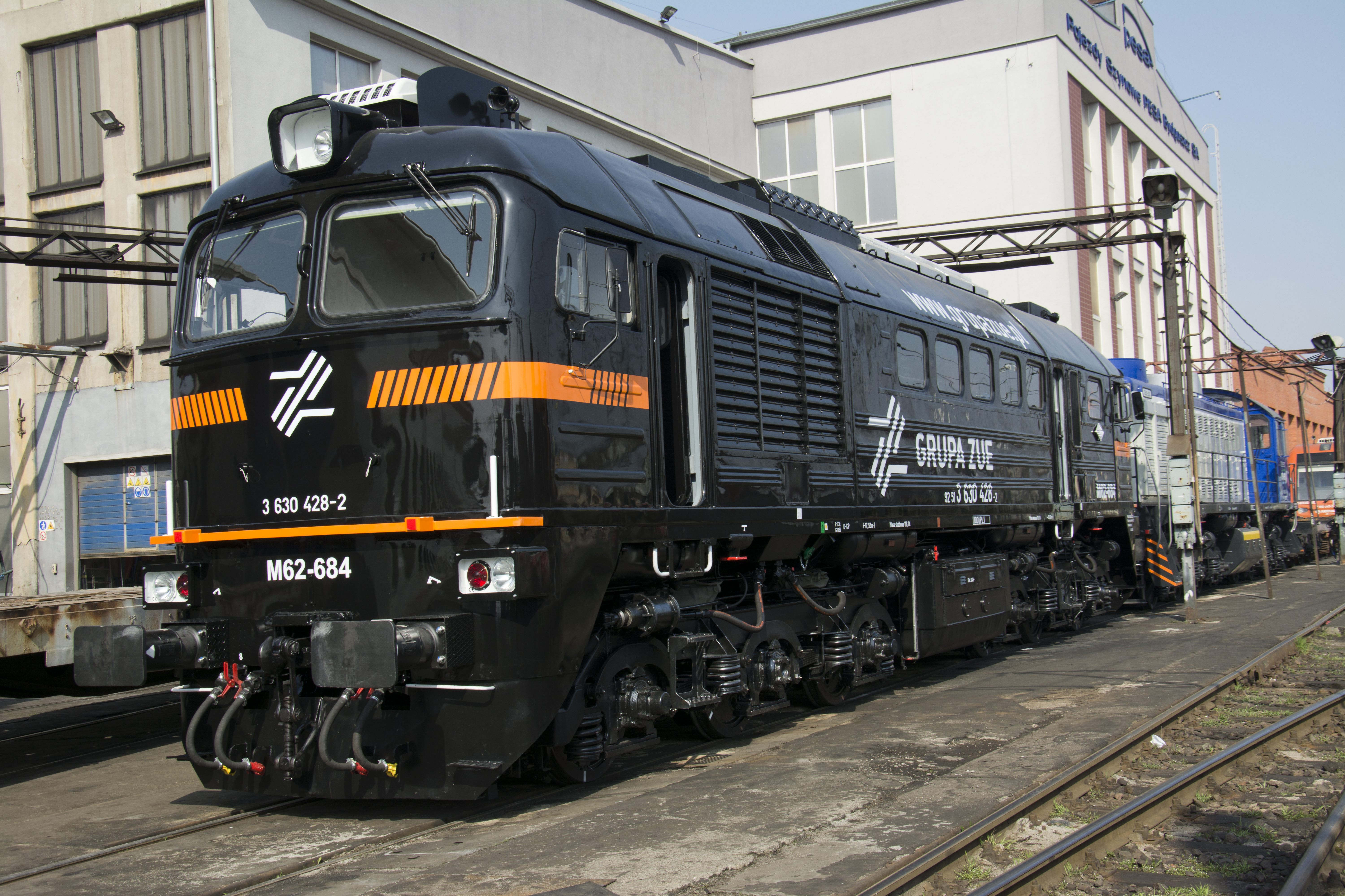 Zmodernizowana lokomotywa M62-684 dla Grupy ZUE w bydgoskich zakładach Pesy.